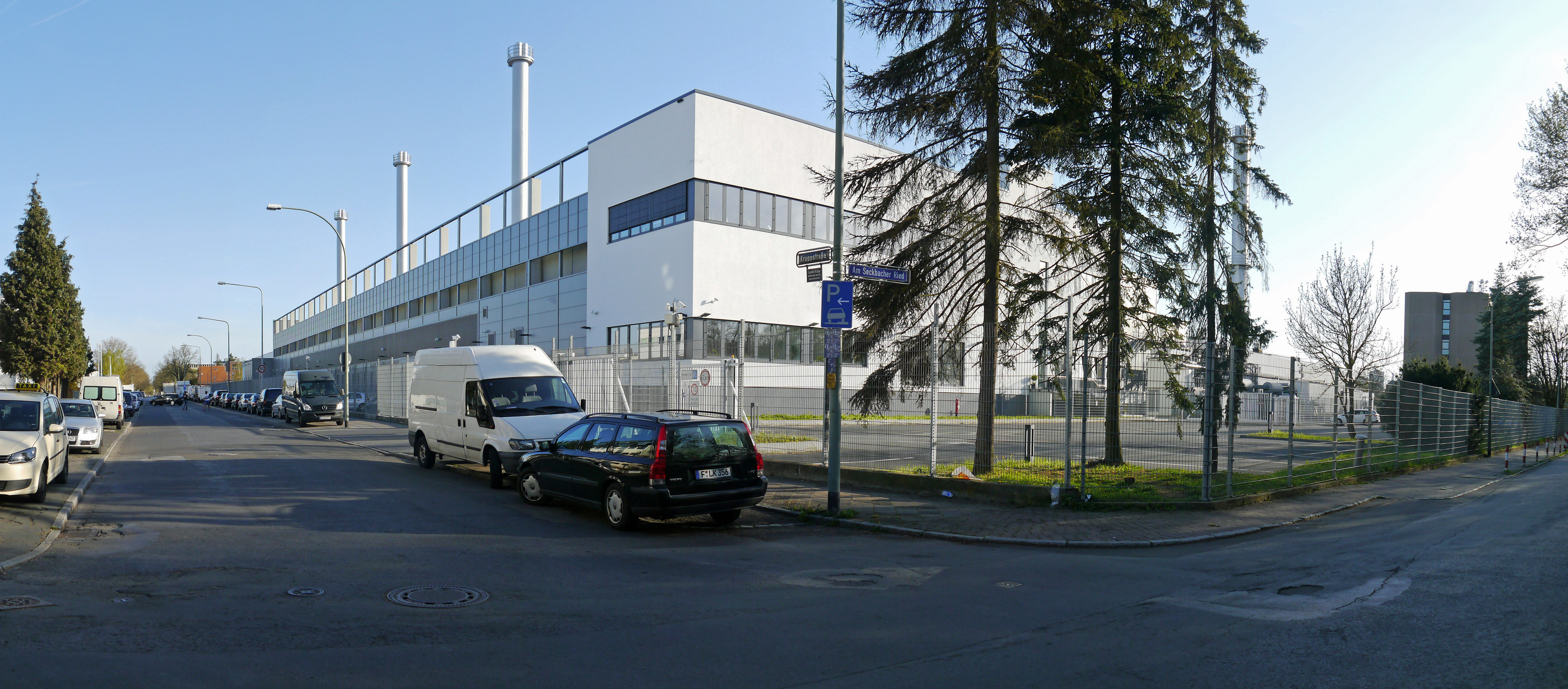 Equinix-Rechenzentrum, Kruppstraße, Frankfurt am Main.